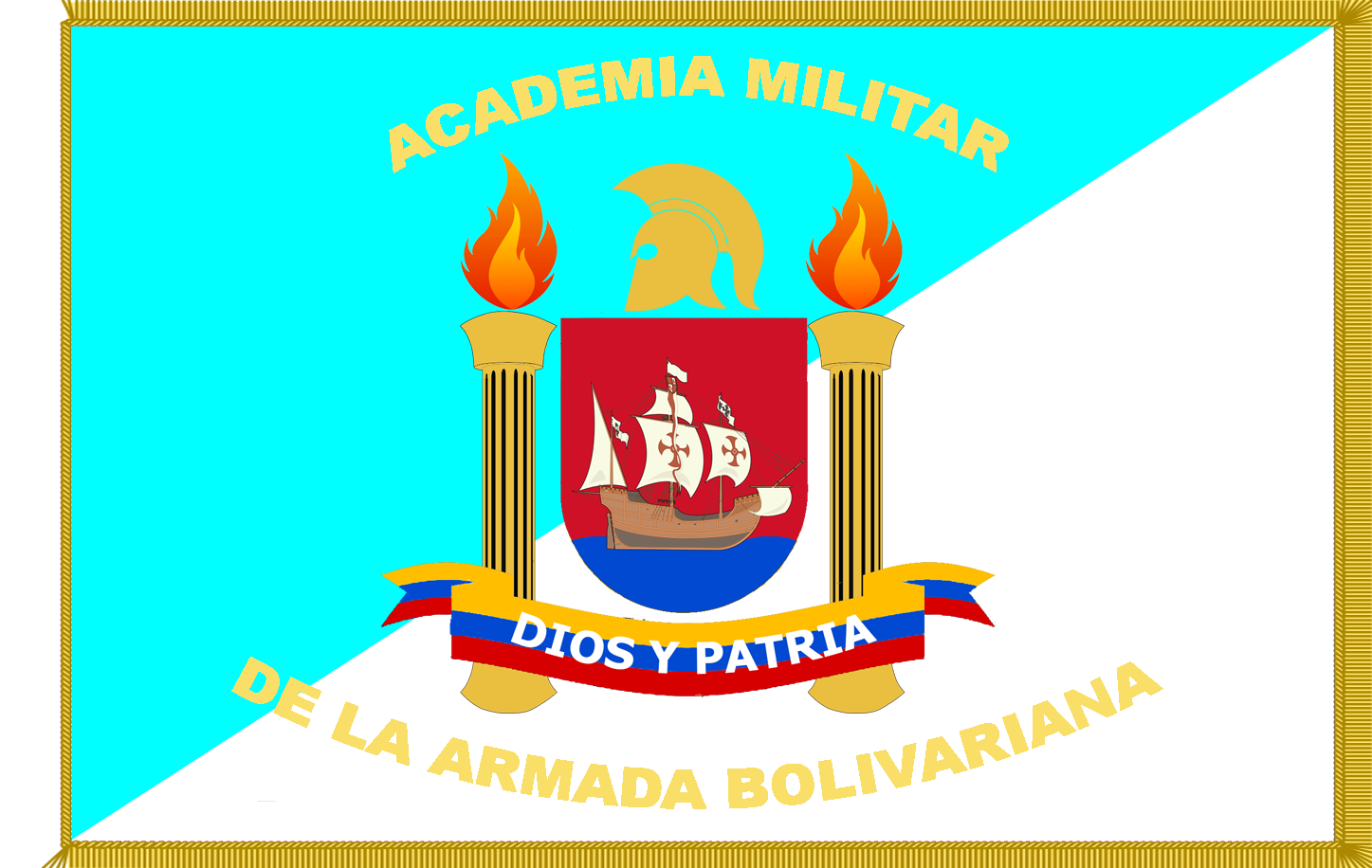 Hecho por Soy Socialista